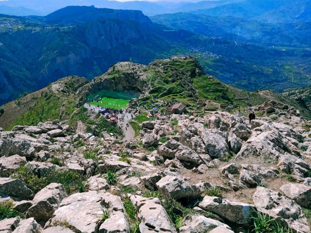 Stade de proximité d'Ath khiyar - Ait(beni) Maouche 2020